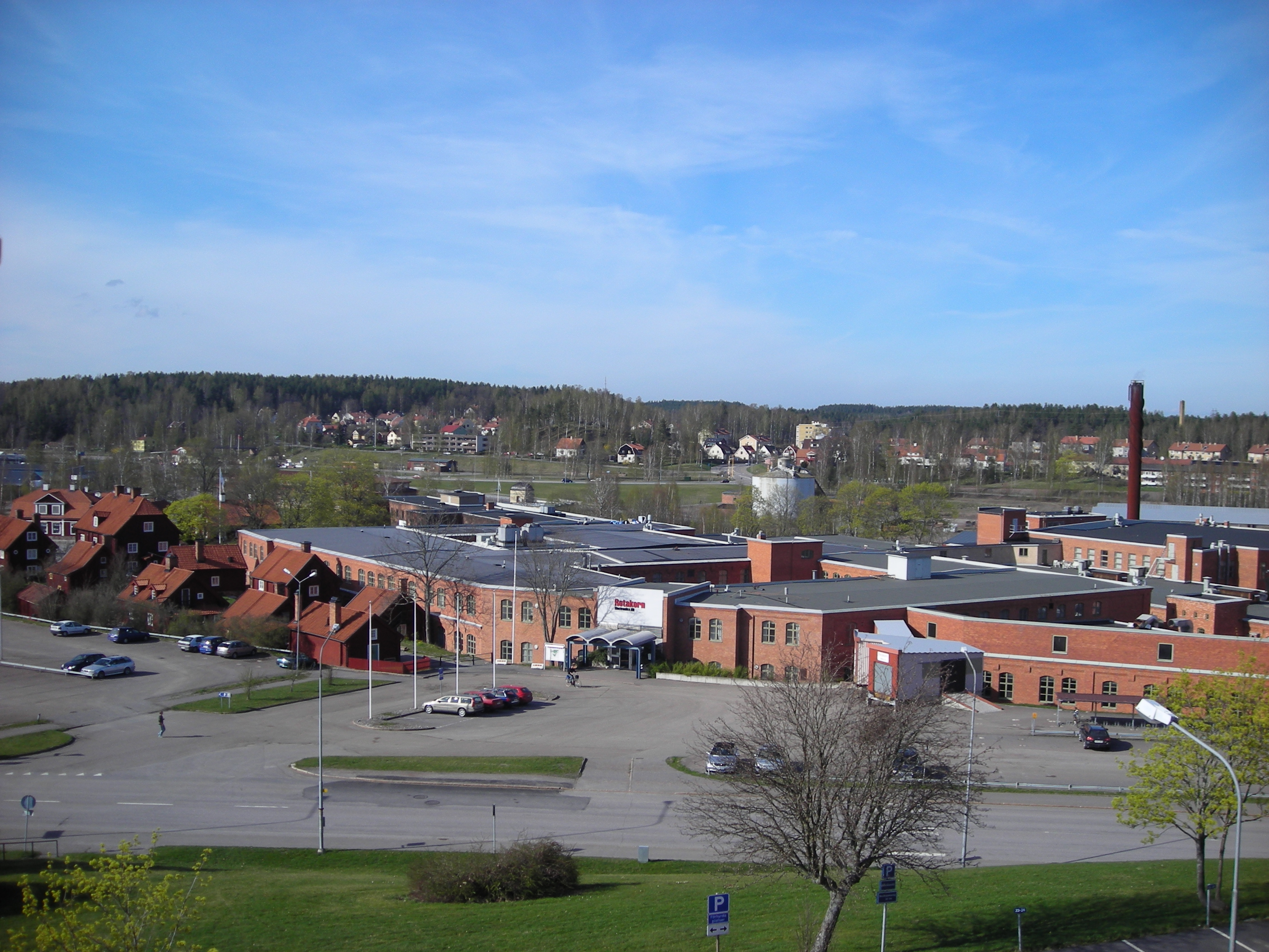 Utsikt över åtvidaberg där bl.a FACITS gamla lokaler kan ses.